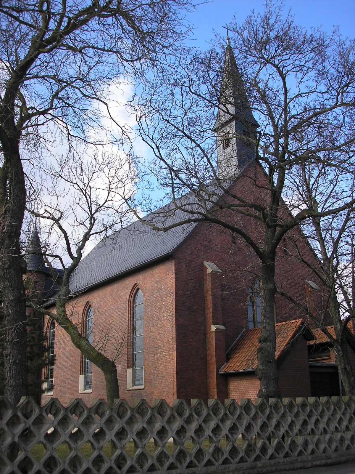 Die Josefskirche in der Bogenstraße in Erfurt (Thüringen).